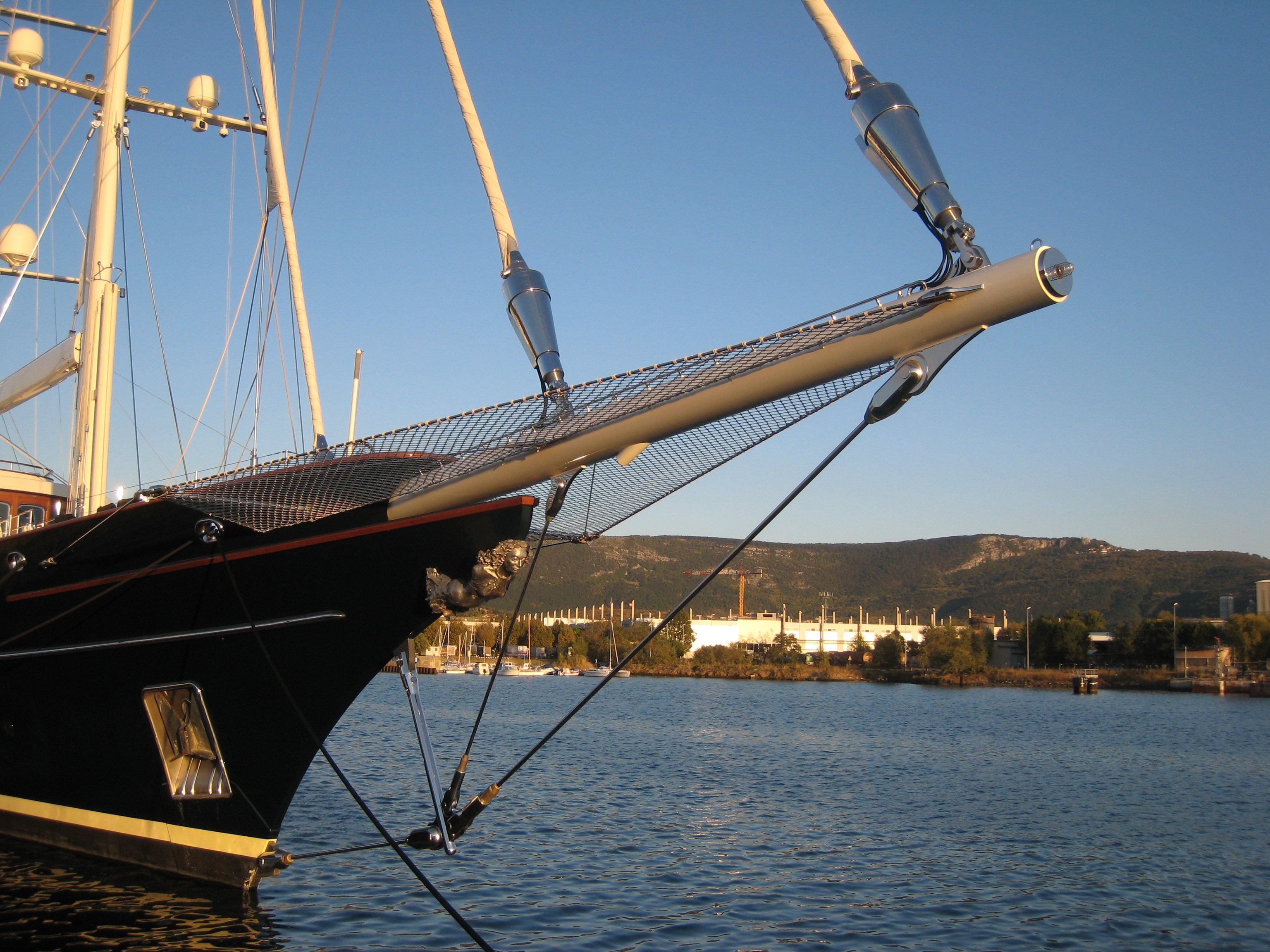 Il bompresso di un moderno veliero. Ottobre 2008